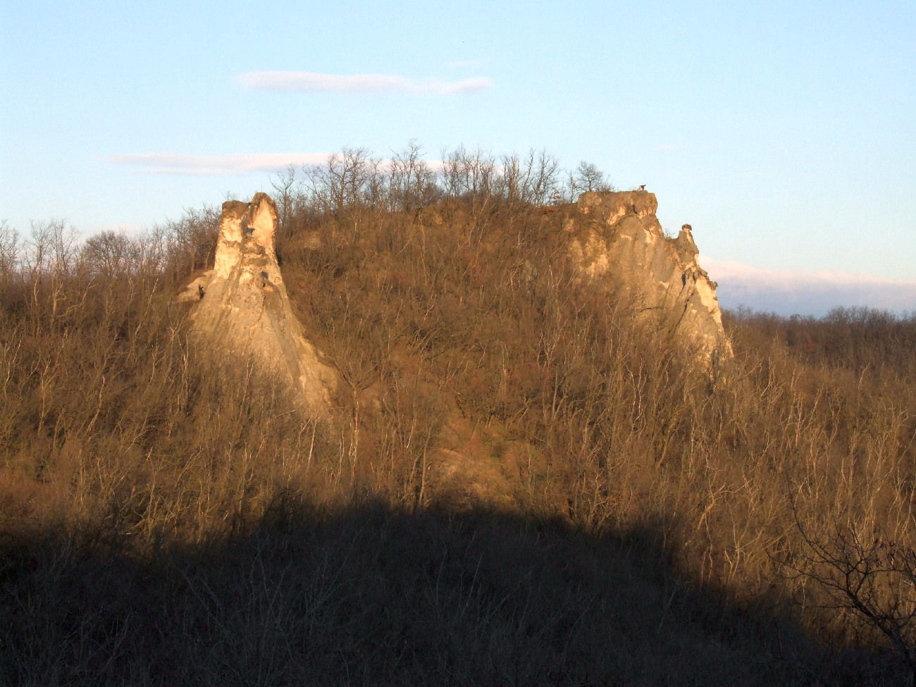 H6b, Sirok, Törökasztal